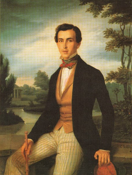 Иван Петрович Новосильцев (1827–1890)